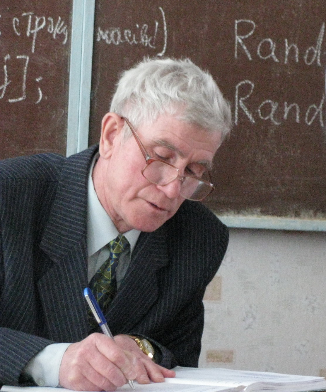 Урок информатики